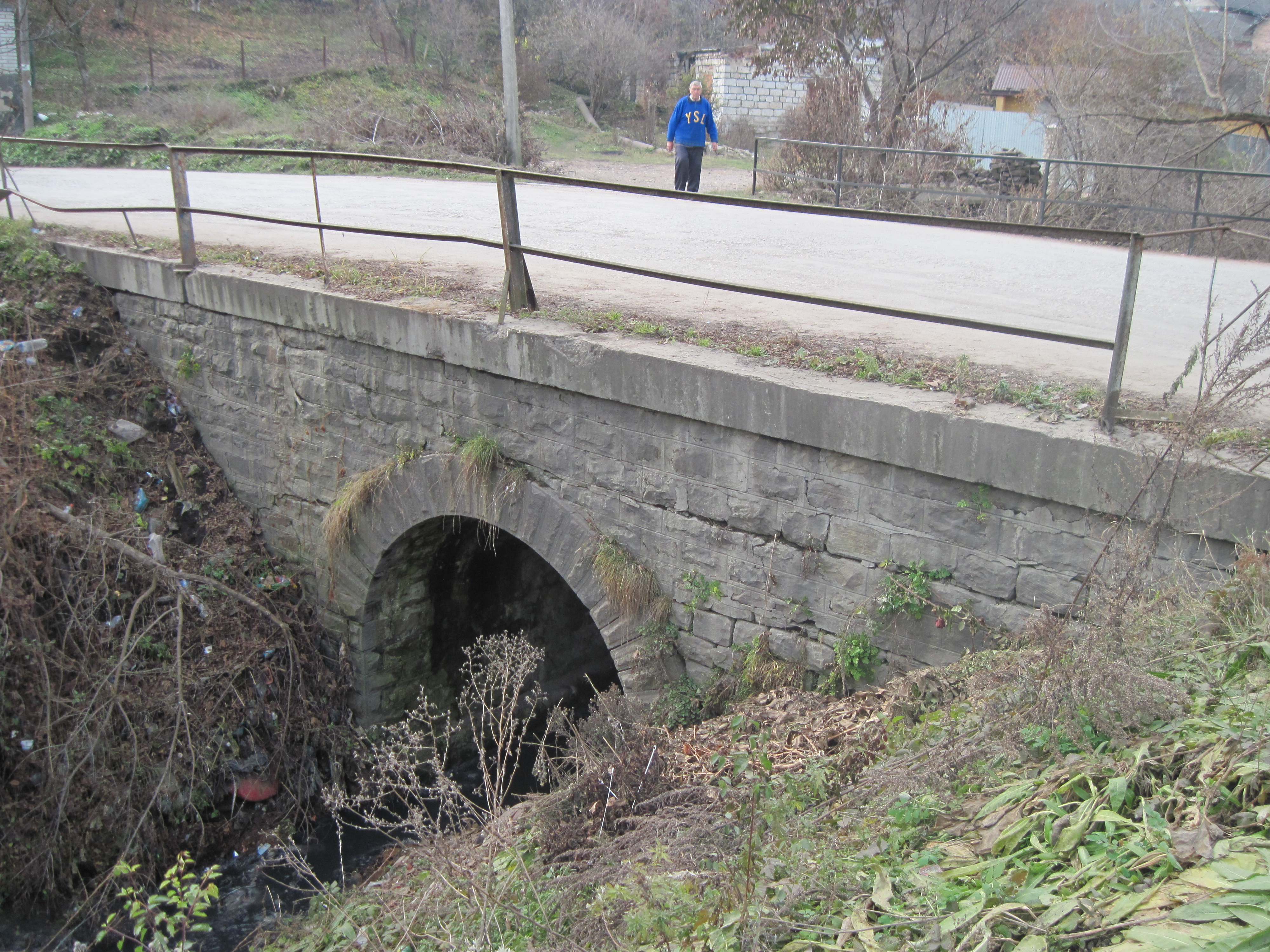 Старий міст, Нагірянка-Бучач